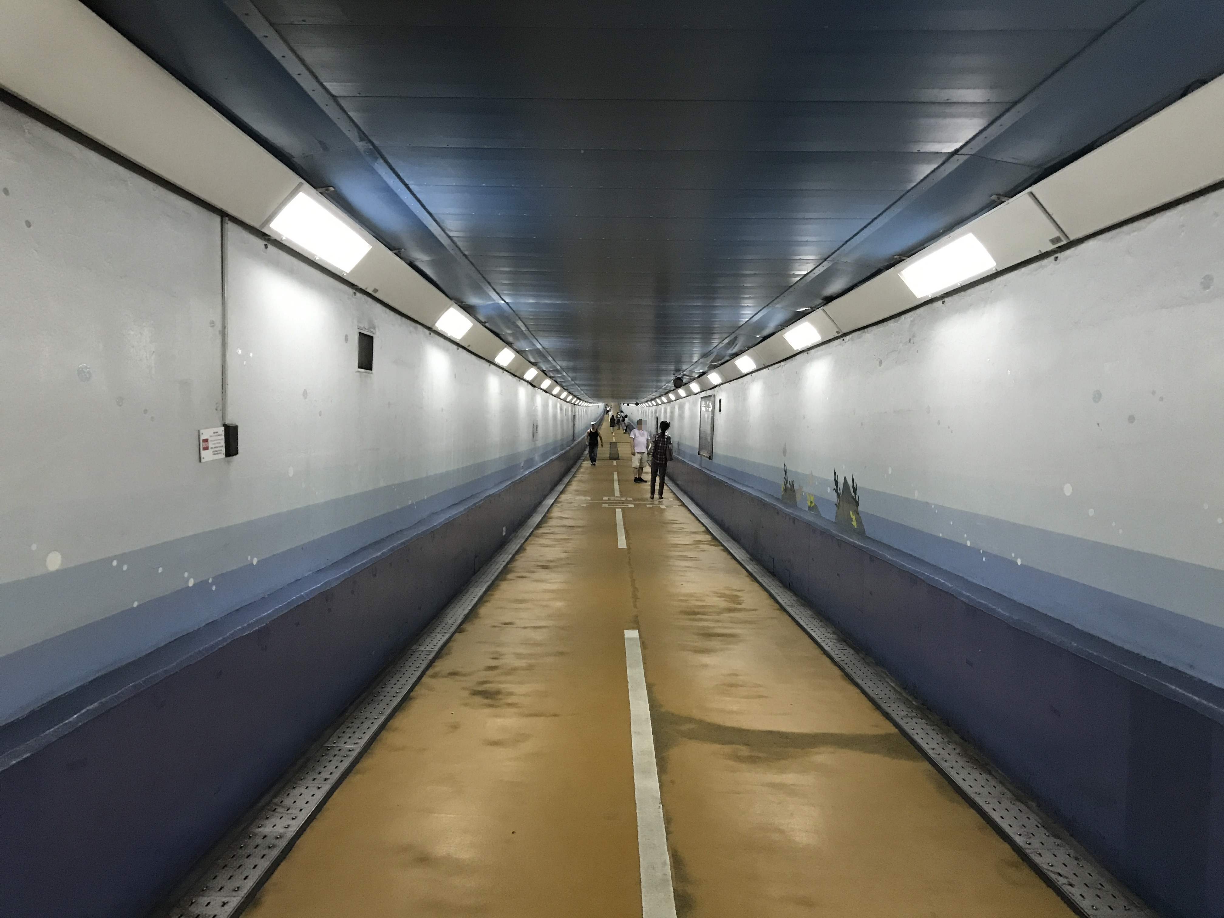 関門トンネル人道